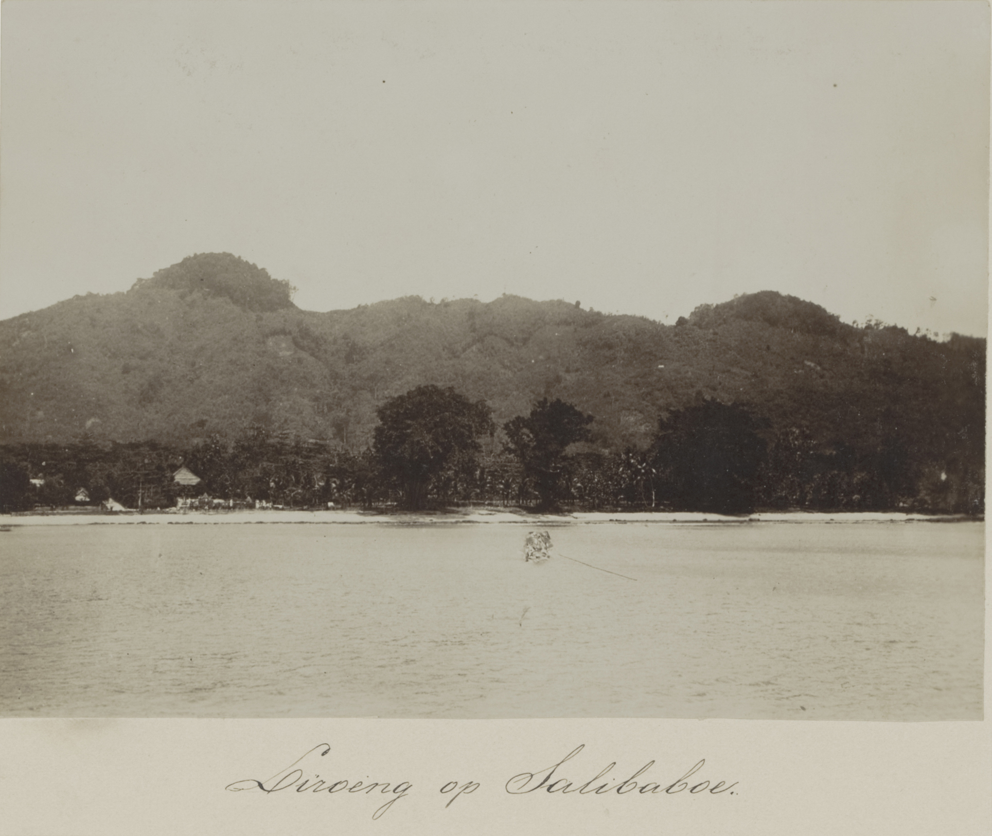 Academische Collecties: 1899-1900, Siboga-expeditie naar Nederlands Oost-Indië, onder leiding van Max Wilhelm Carl Weber Gezicht op de kampong.